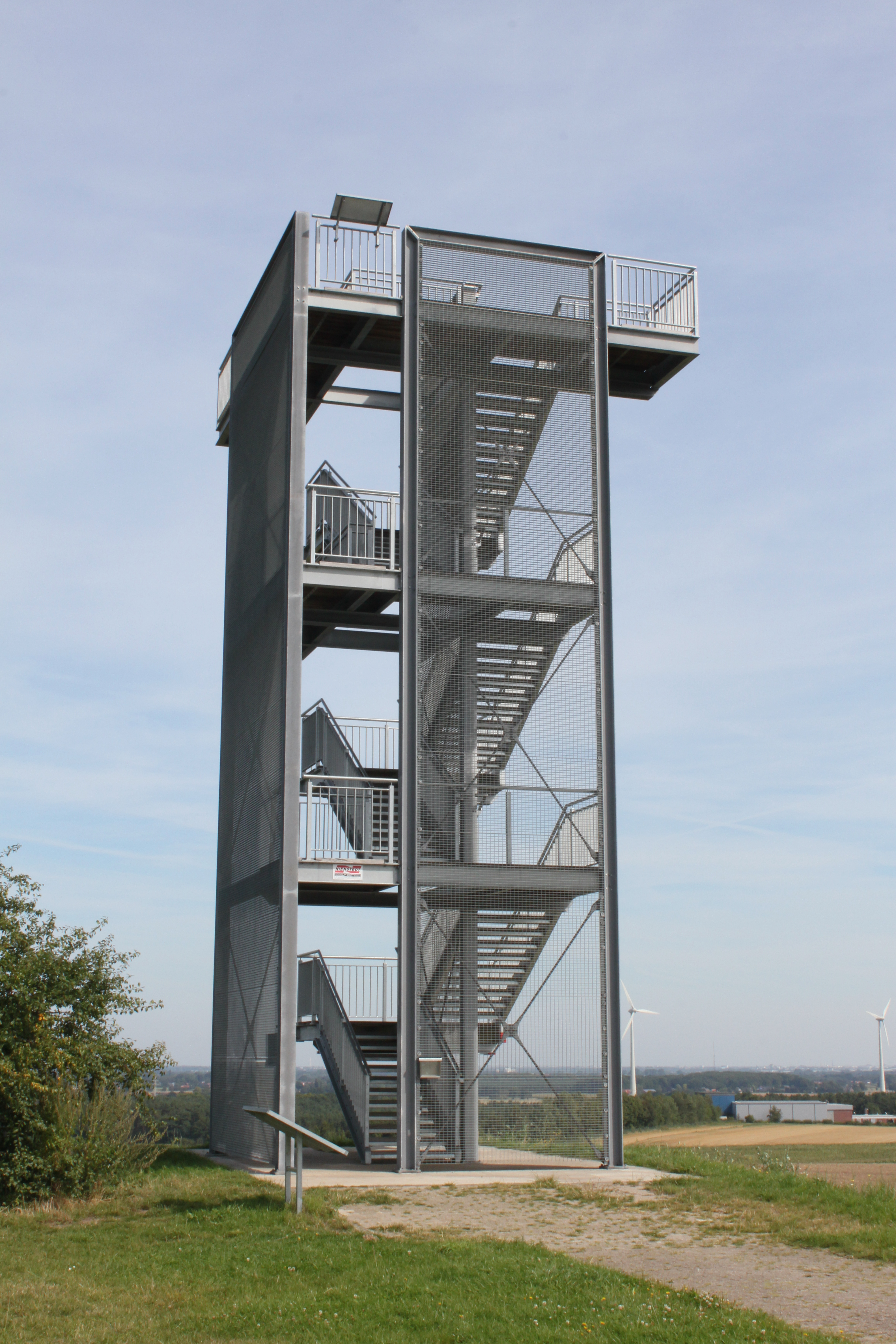 Aussichtsturm auf dem Hohen Berg in Syke-Riestedt